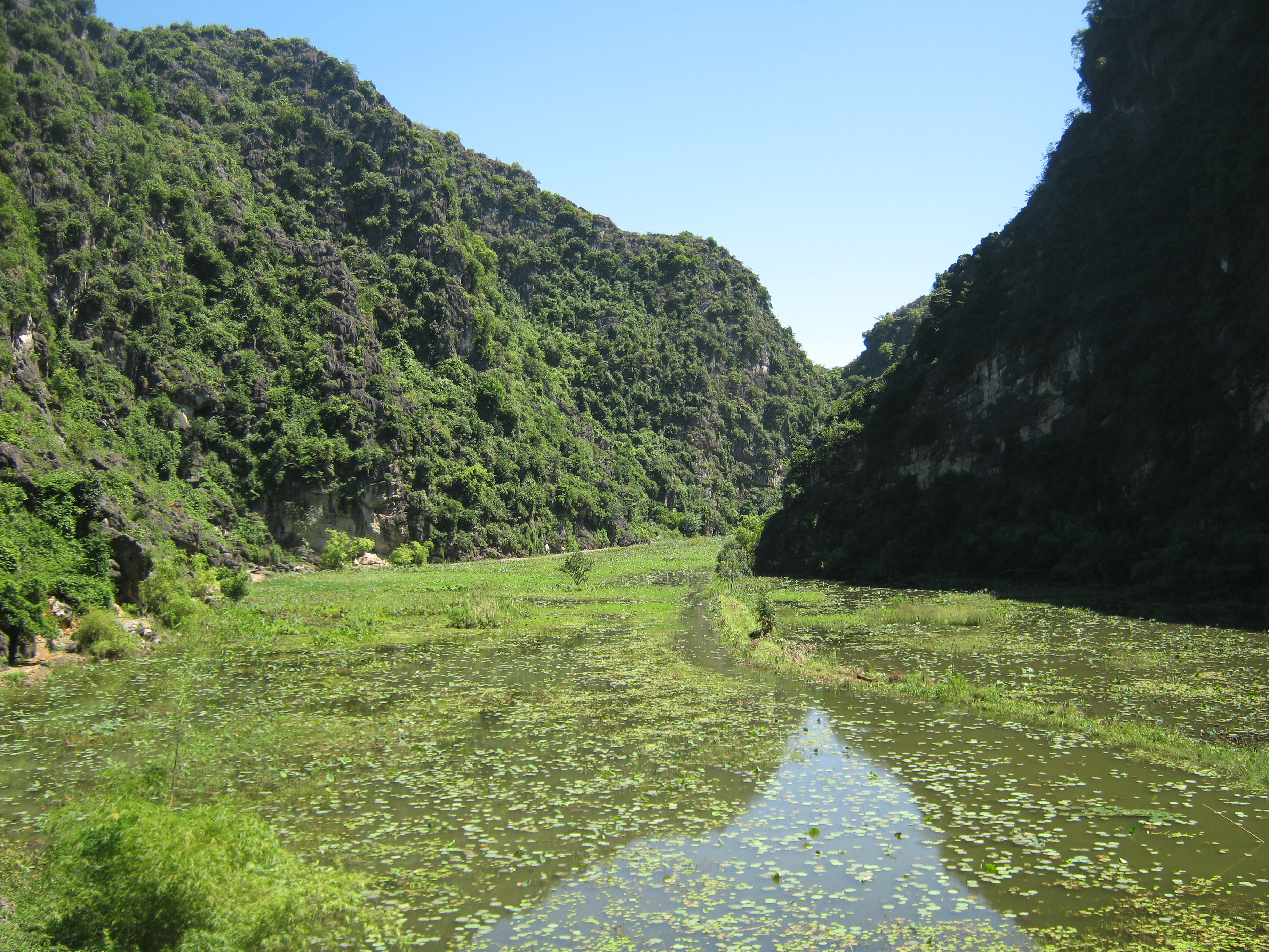 Phong cảnh chùa động Am Tiên ở cố đô Hoa Lư, Ninh Bình.